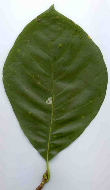 Nyssa sylvatica